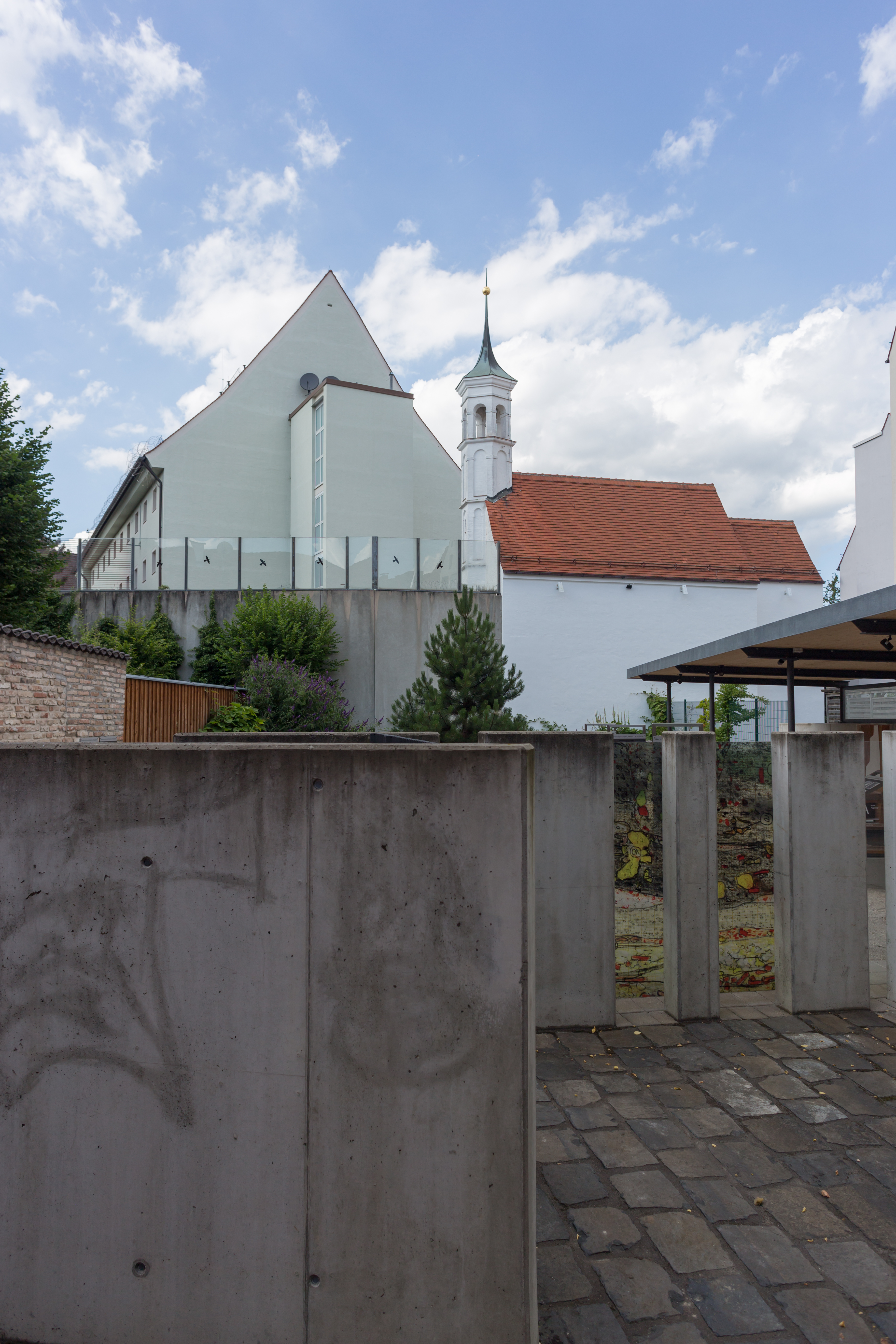 Blick hinweg über die Mauern des Archäologischer Garten (Augsburg), JVA Augsburg Institution I und die Kapelle St. Severin. Hier ist auch der Stacheldraht auf dem Dach der JAV sichtbar.